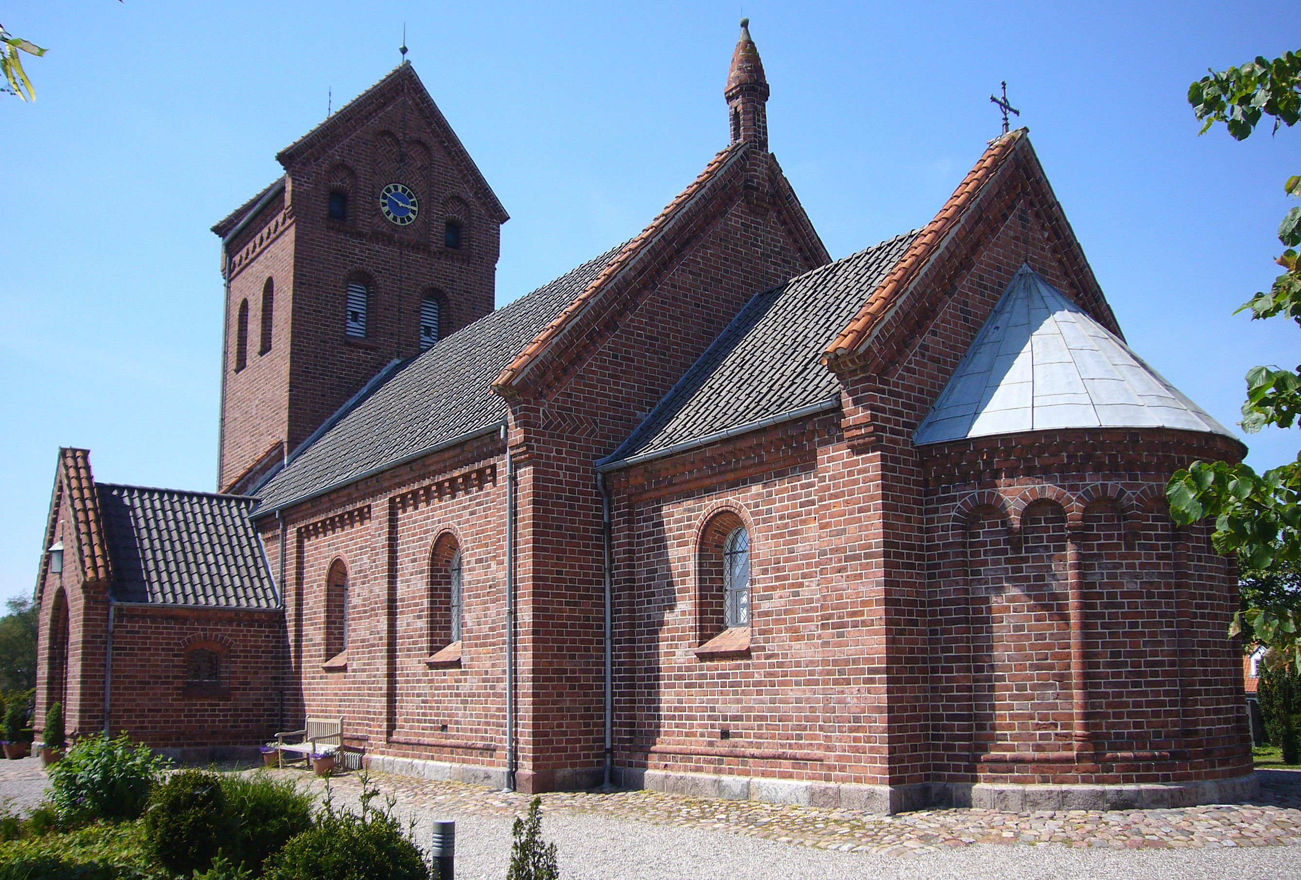 Vindinge Kirke, Roskilde County, Denmark.